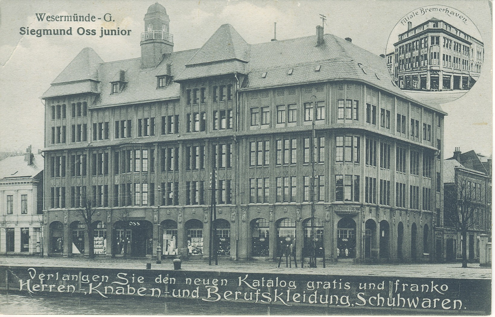 Kaufhaus Siegmund Oss an der Kaistraße, Geestemünde